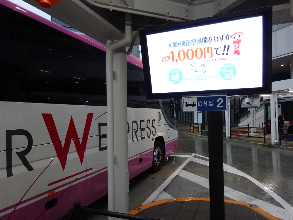 大崎バスターミナル